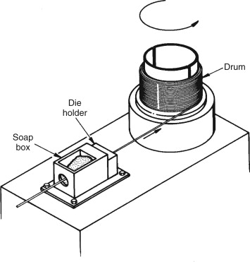 trefiladora